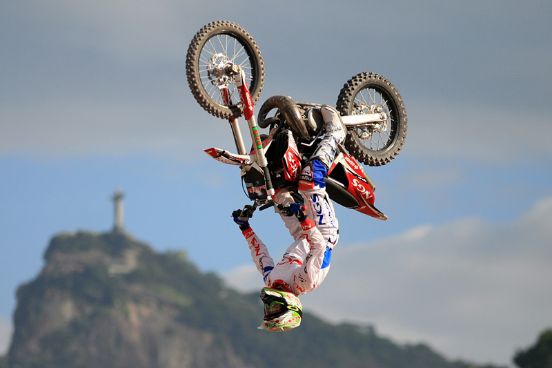 Backflip no sábado e o céu quase azul Red Bull X-Fighters etapa Rio de Janeiro